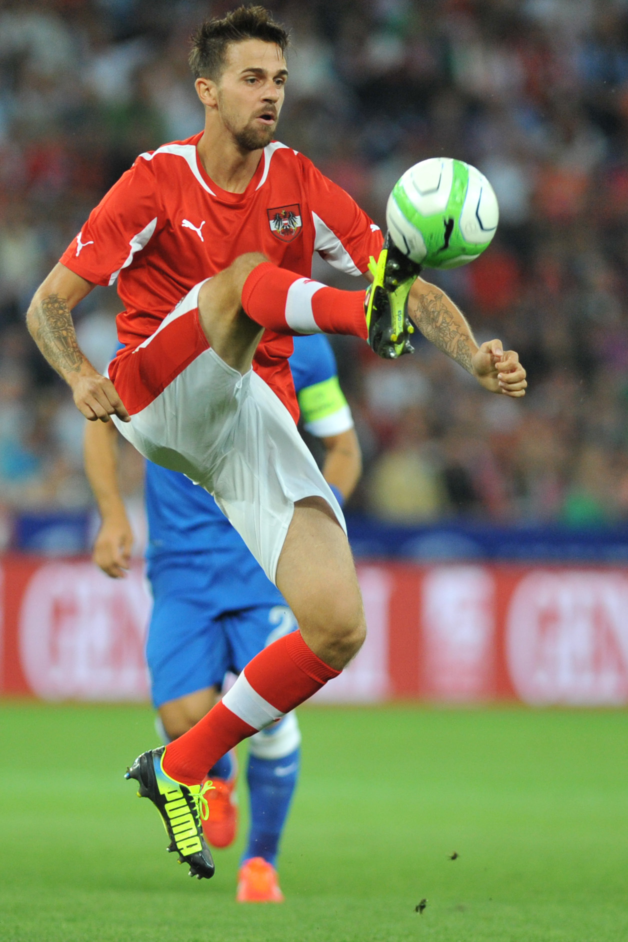 Freundschaftliches Länderspiel Österreich - Griechenland am 14. August 2013 in Salzburg: Martin Harnik